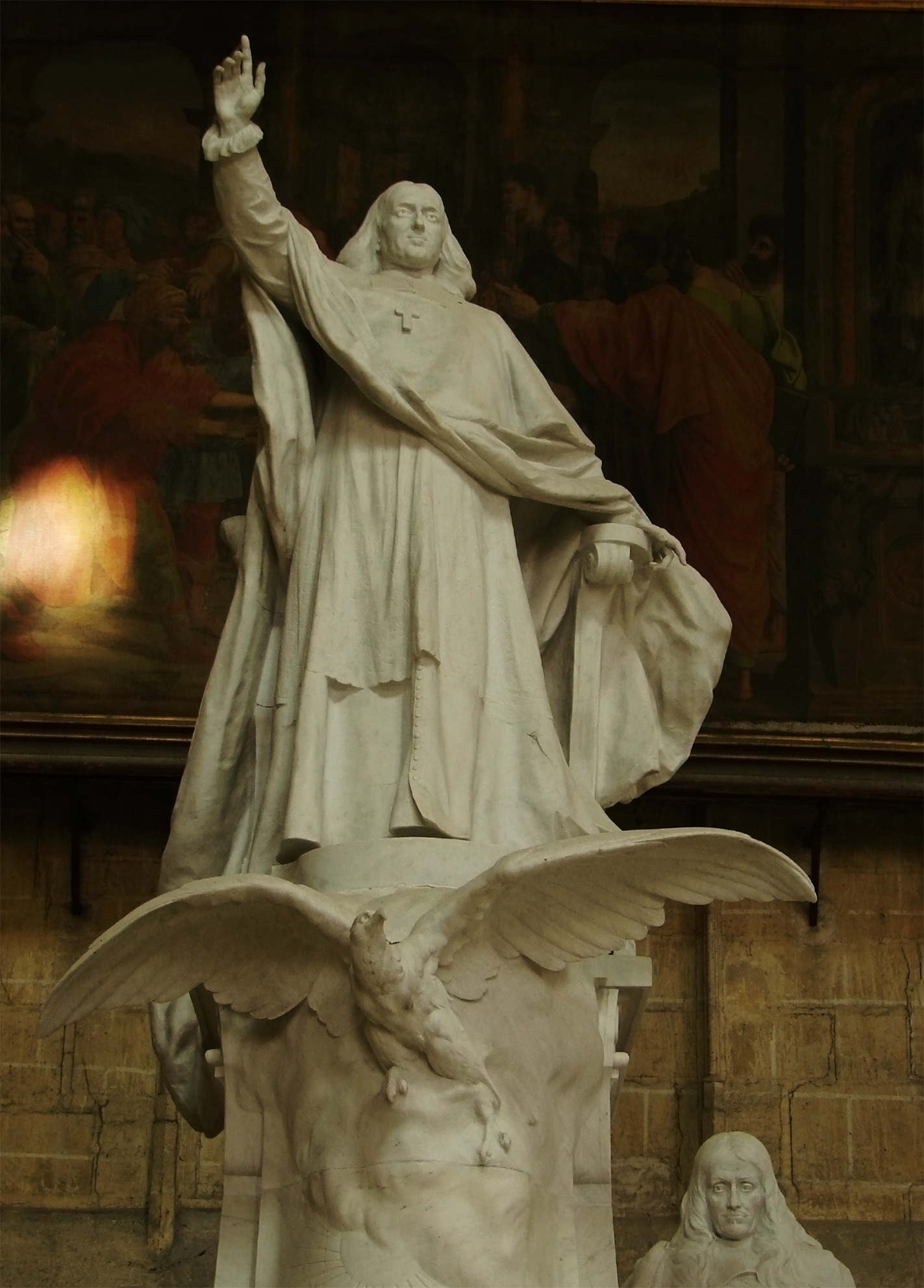 Le Grand Monument de Bossuet, oeuvre d'Ernest Henri Dubois (Dieppe 16/03/1863 - Paris 30/12/1930), placé dans la cathédrale de Meaux en 1911; détail.